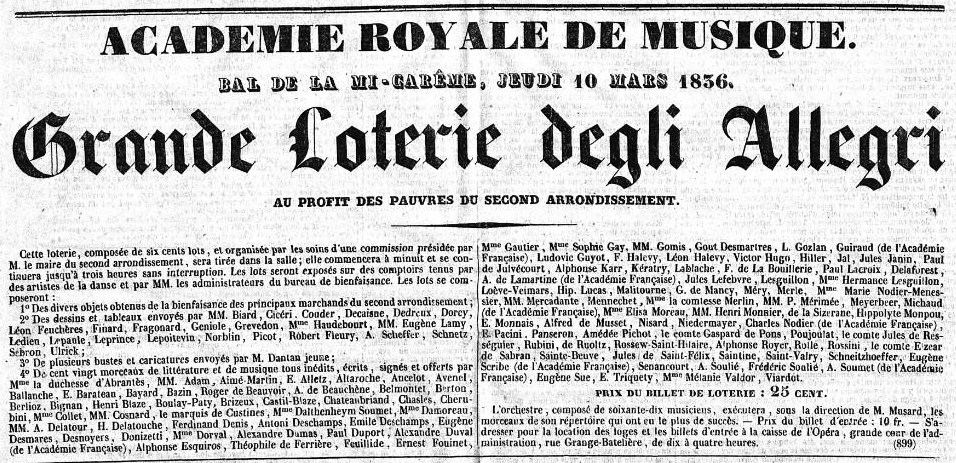 Annonce du bal de l'Opéra et d'une loterie organisés pour la Mi-Carême 1836 à Paris.